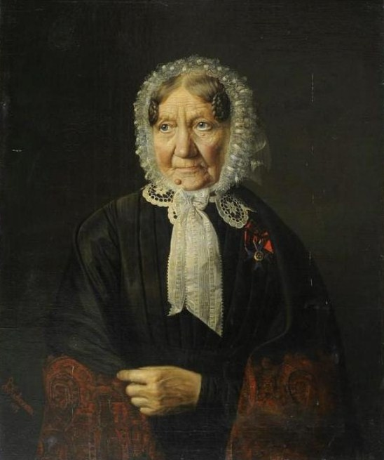 Портрет дамы с Мариинским знаком отличия беспорочной службы 1 степени.